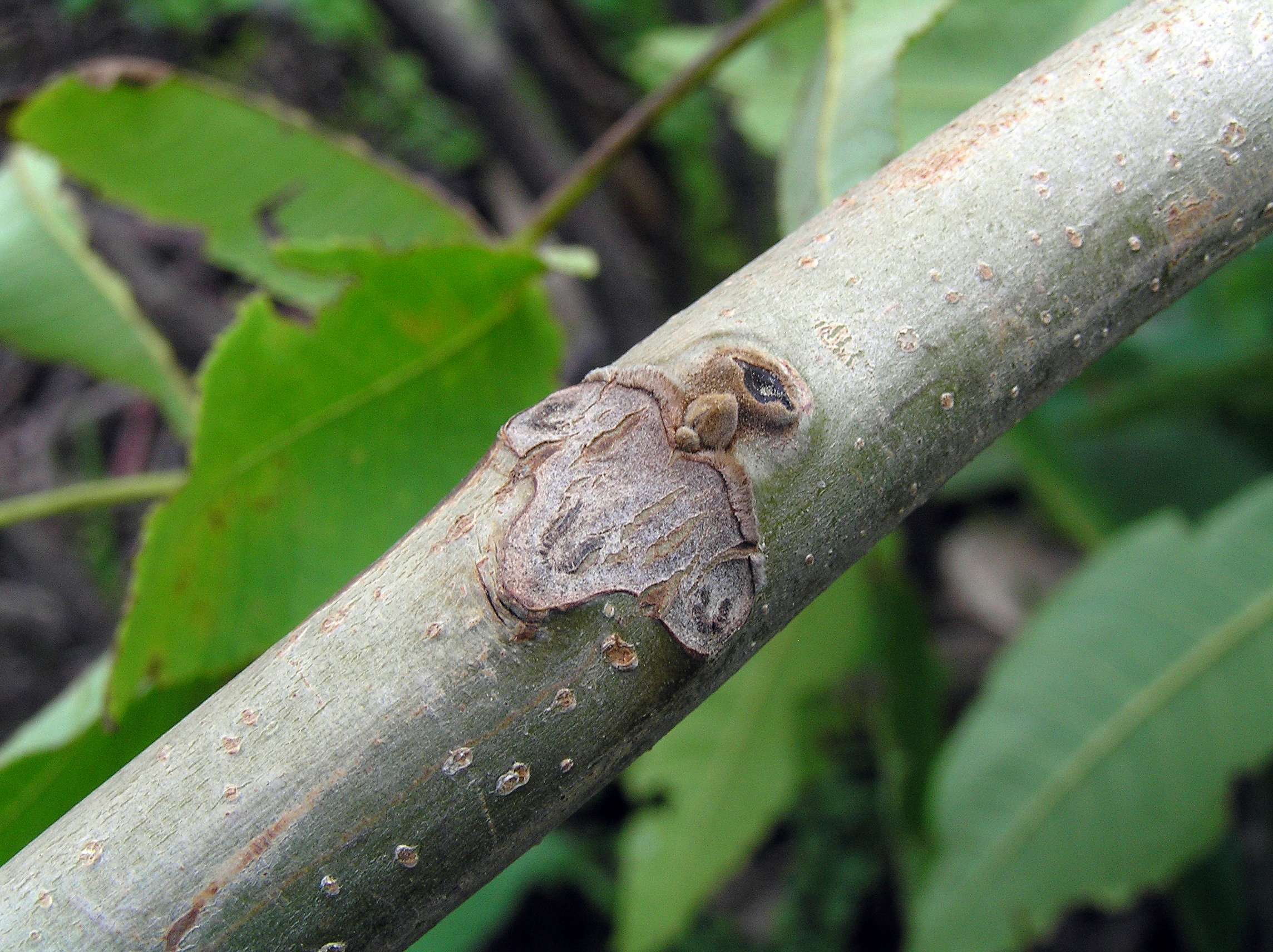 Mandzuuria pählipuu varrel olev lehearm